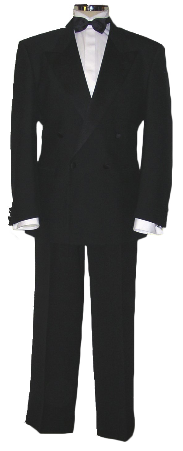 Esmoquin